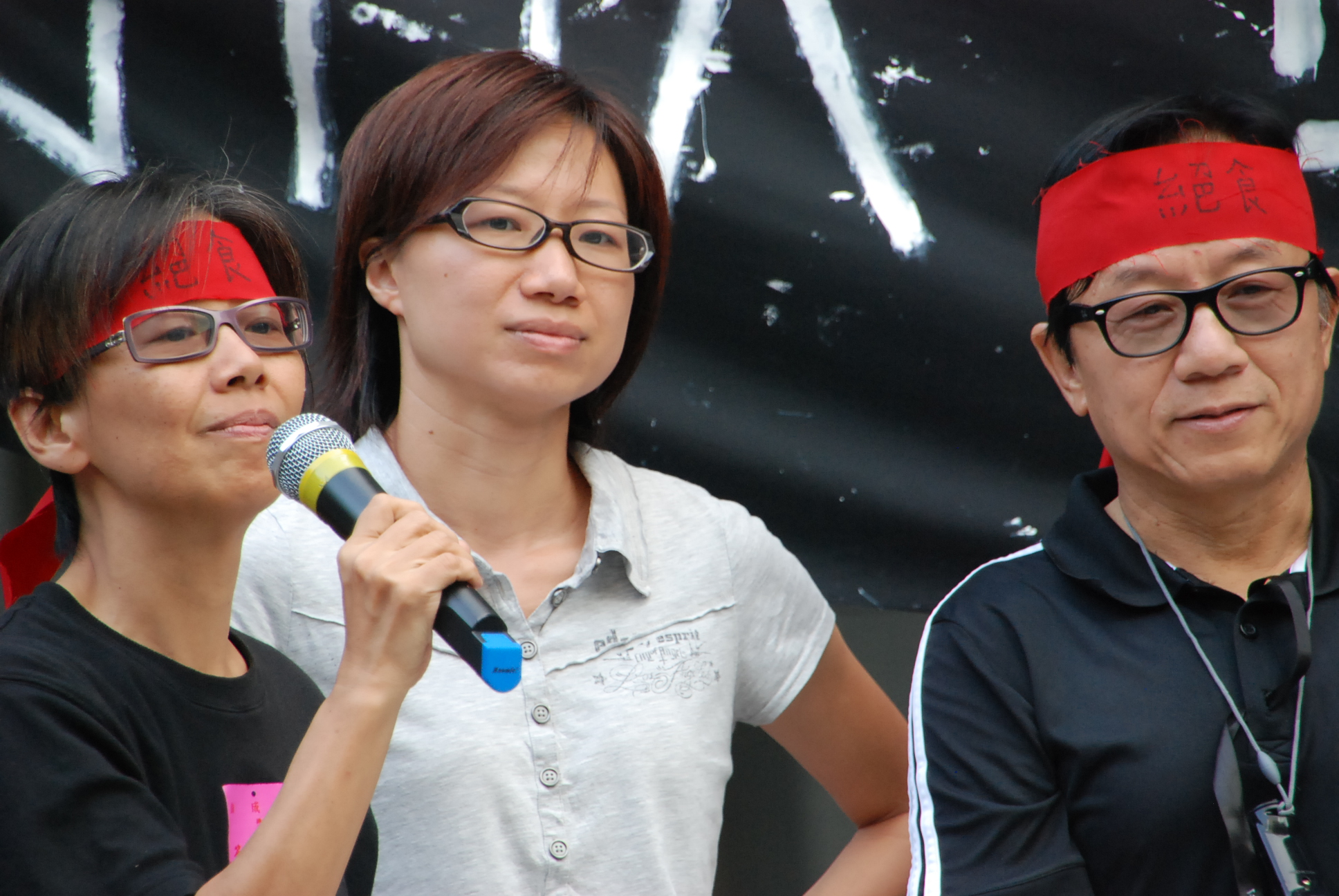 兩位絕食人士何芝君(左)與黃瑞紅(中)絕食約48小時後，身體不適，結束絕食